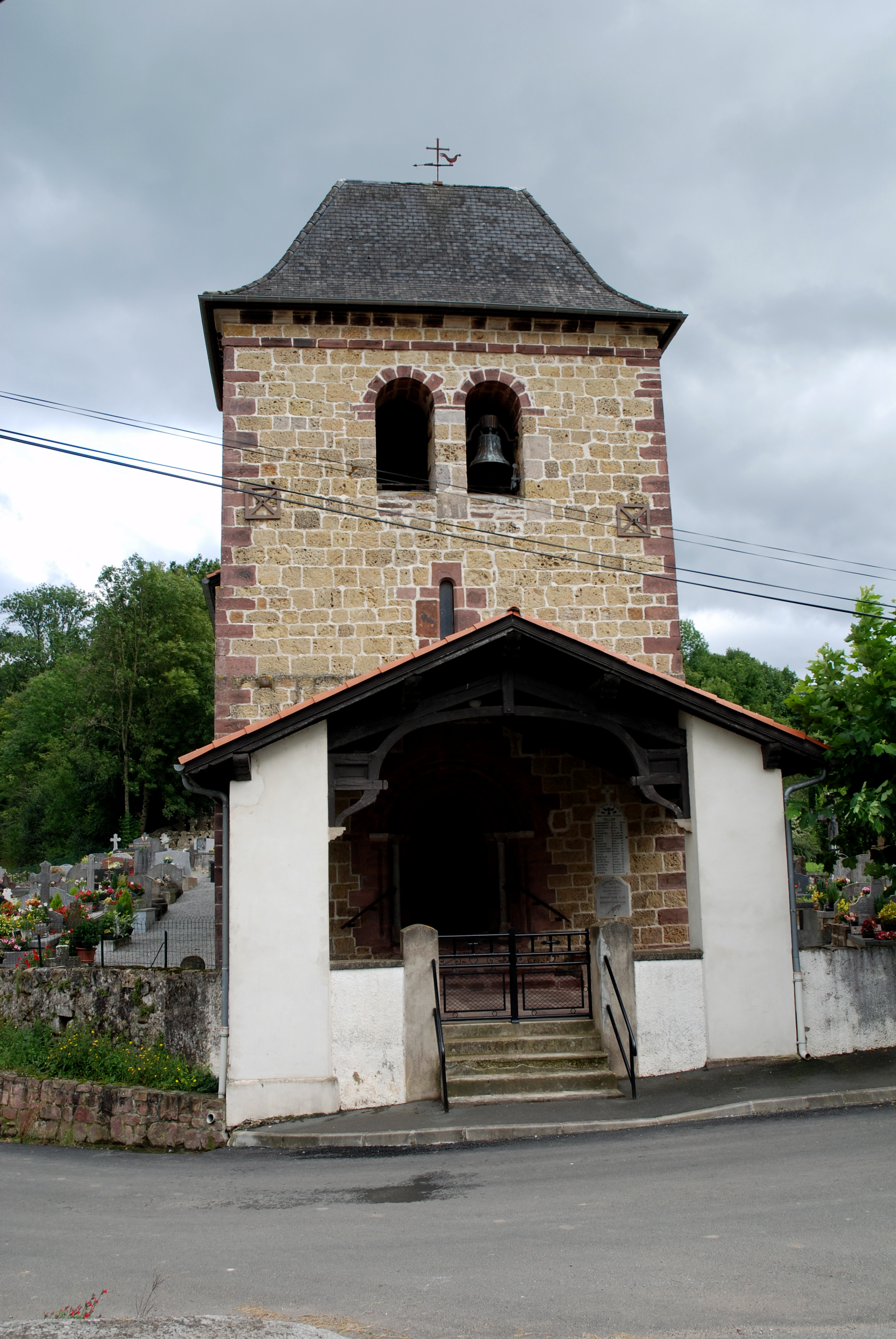 Mendive, église Saint-Vincent